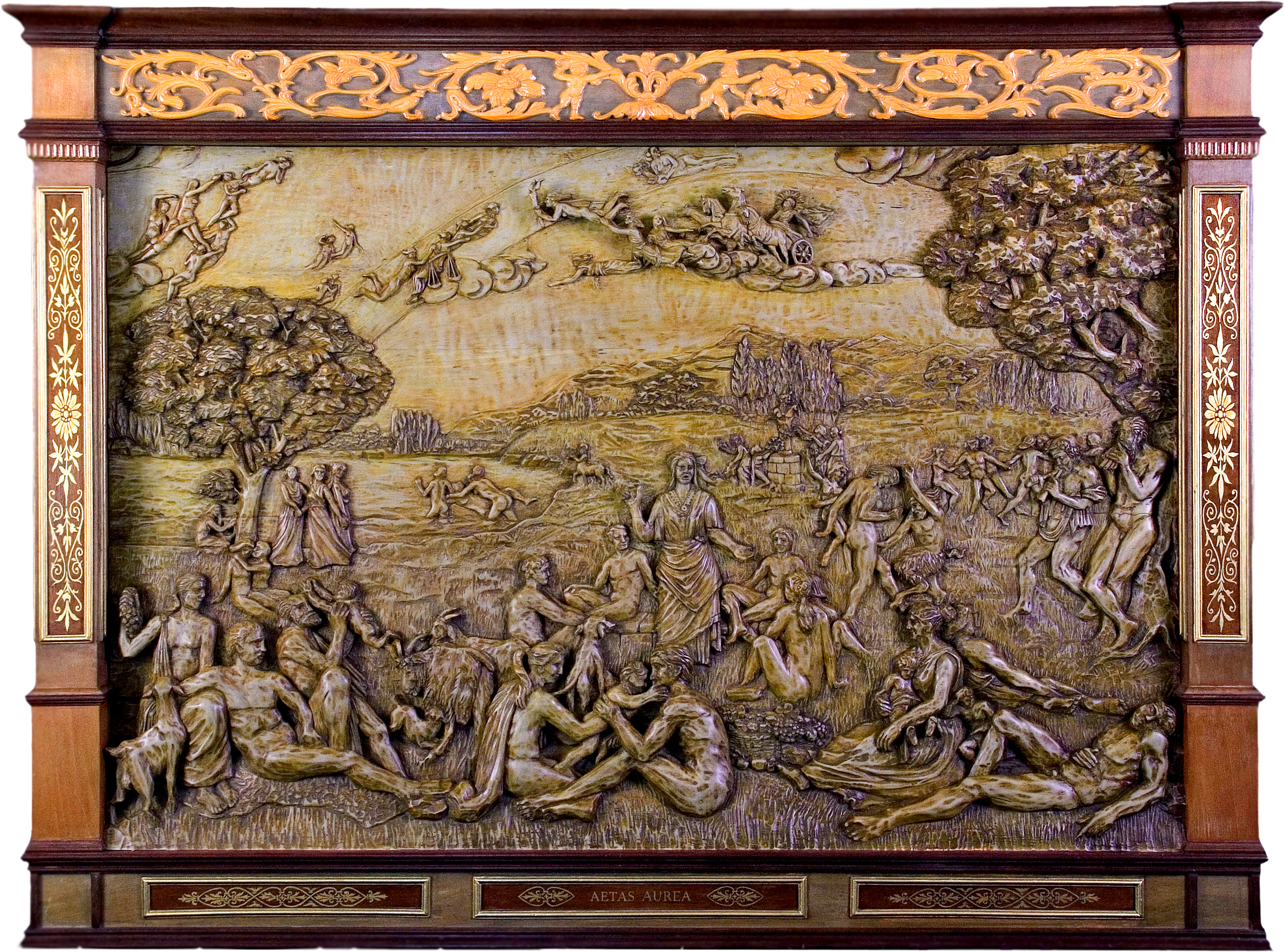 Altorrelieve tallado en madera por J. M. Félix Magdalena,de 151 por 112 cm. inspirado en el mito clásico de la Edad de Oro